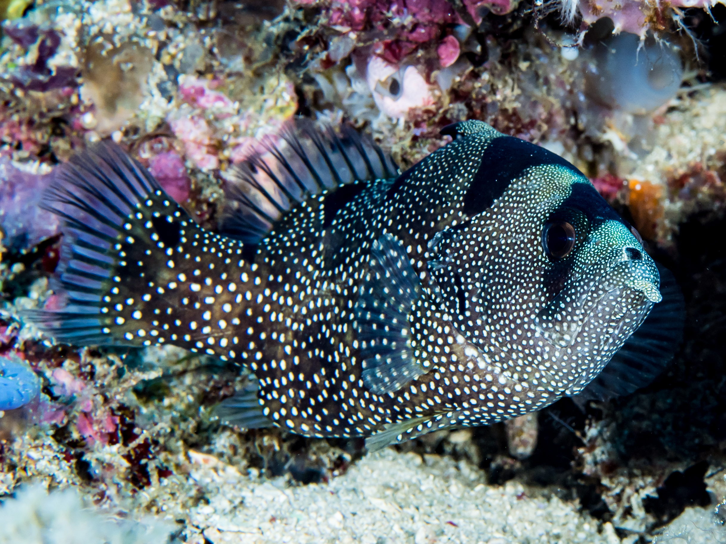 Morotai, Indonesia - Spotted soapfish (Pogonoperca punctata)